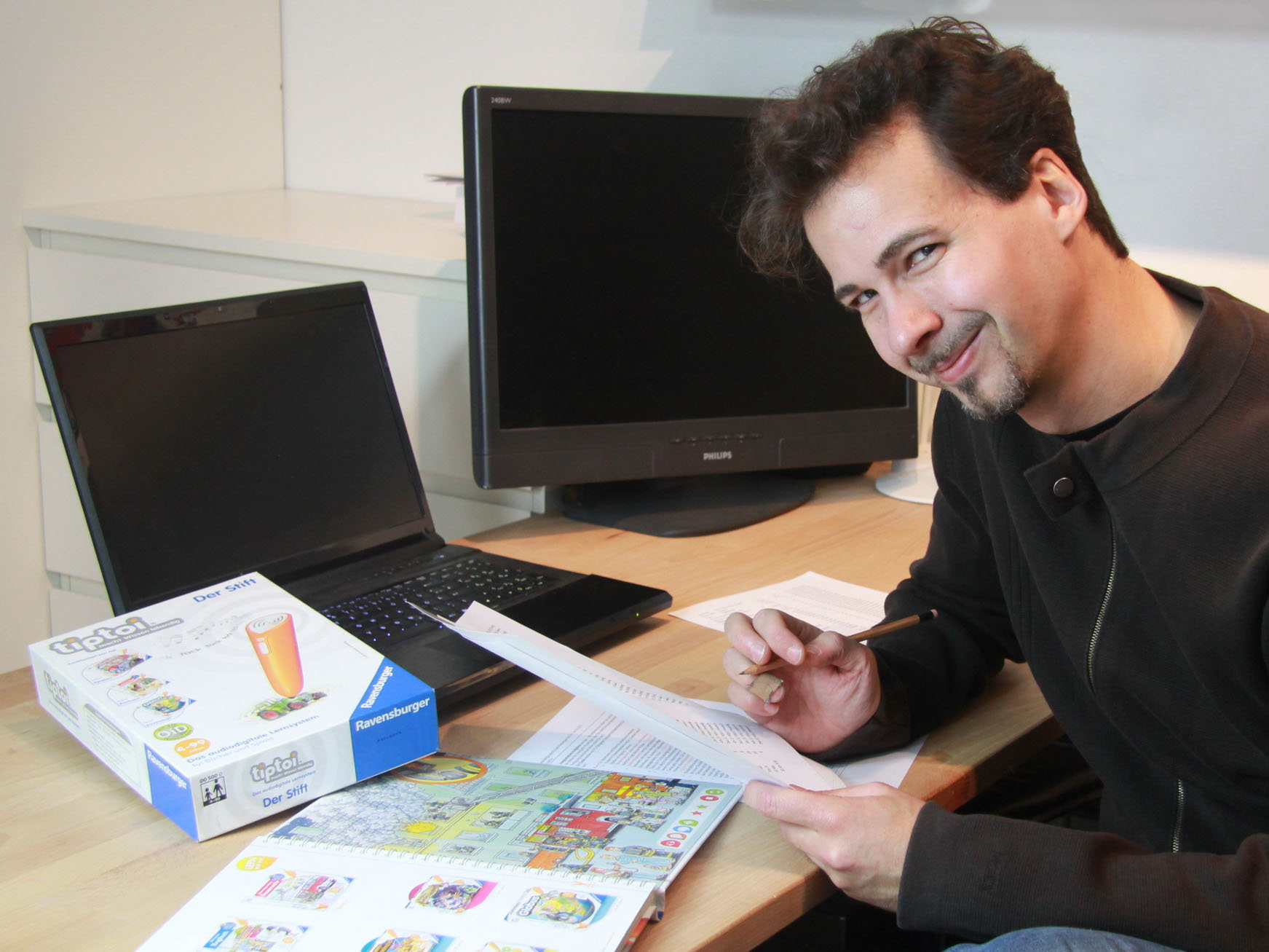 Arno Steinwender, Österreichischer Spieleautor